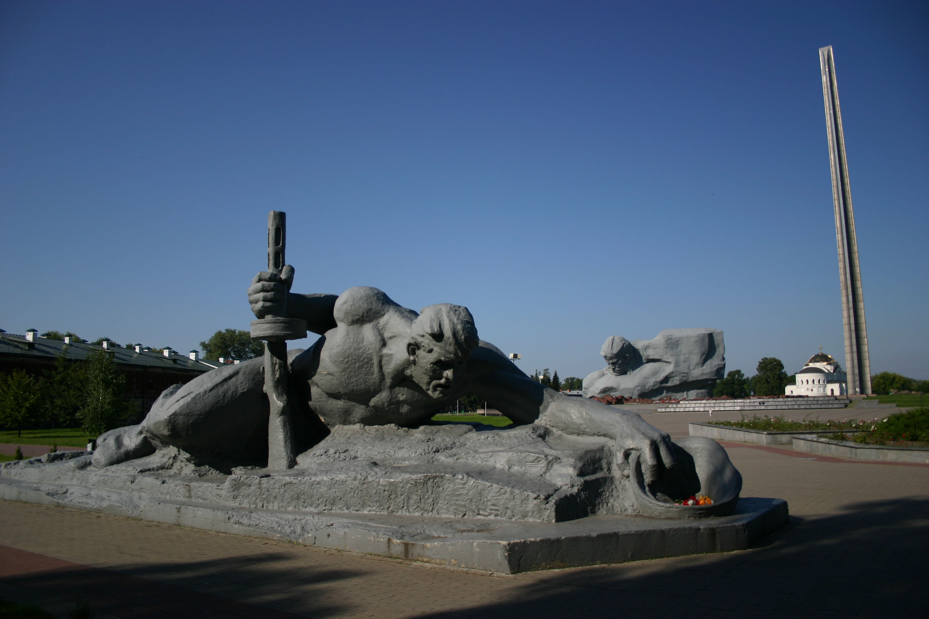 Twierdza w Brześciu nad Bugiem, dziedziniec wewnętrzny. Na pierwszym planie monumentalna rzeźba "Pragnienie" przedstawiająca konającego żołnierza zbierającego deszczówkę do hełmu. Po lewej zabudowania twierdzy. W głębi monumentalny pomnik "Męstwo" oraz Sobór św. Mikołaja w Brześciu. Po prawej obelisk w kształcie ostrza bagnetu